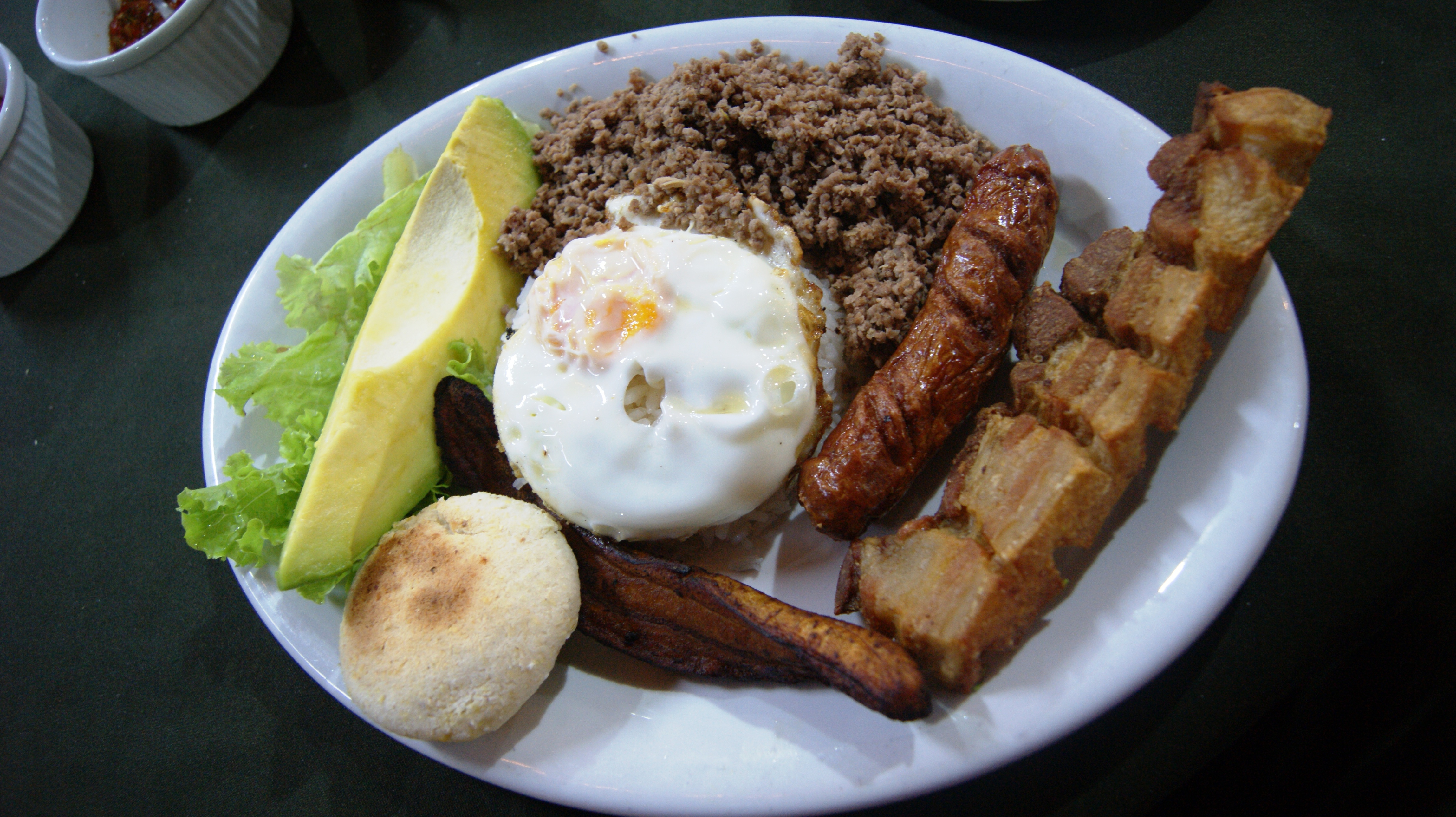 Bandeja paisa. Restaurante Chócolos, Medellín - Colombia.